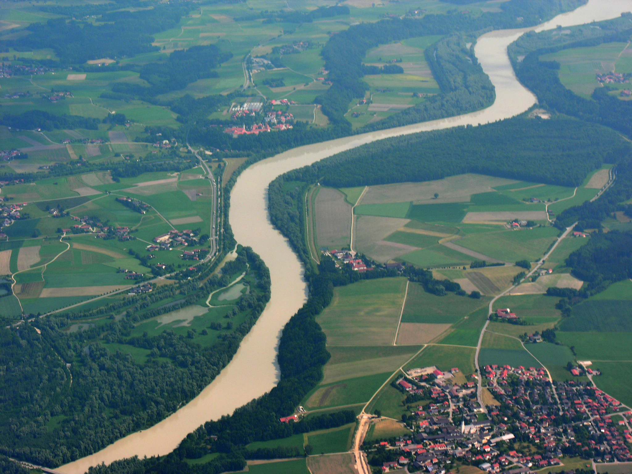 Germany, Bavaria, Inn between Griesstätt and Attel